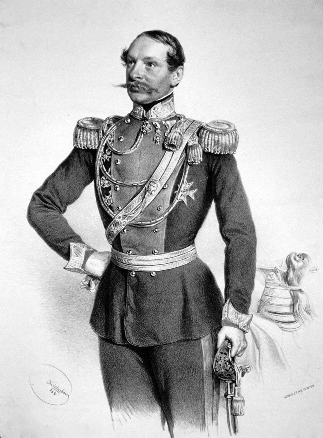 Ferdinand Graf Vetter von der Lilie (1812-1882) als Oberst und Kommandant 3. Uhlanenregiment. Später Feldmarschallleutnant. Lithographie von Josef Kriehuber, 1852